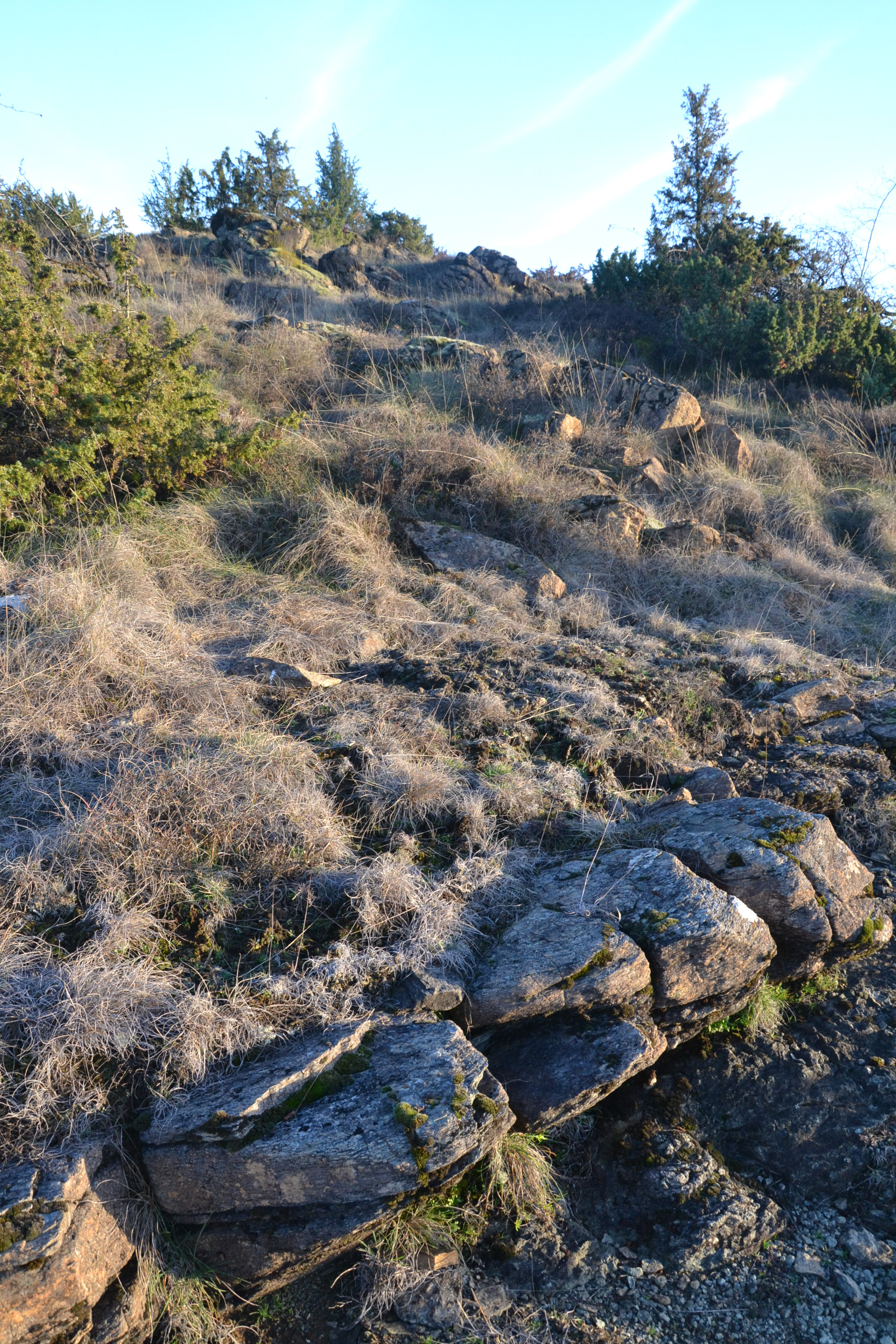 Paysage de la lande serpentinicole de la Flotte et du Cluzeau (Château-Chervix, Haute-Vienne, France).